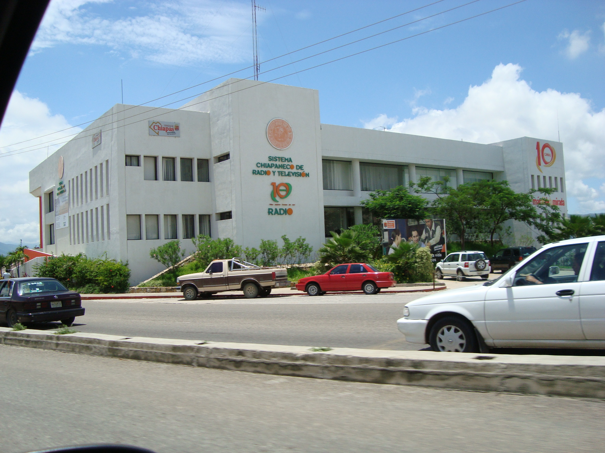 Instalaciones del Sistema Chiapaneco de Radio y Televisión